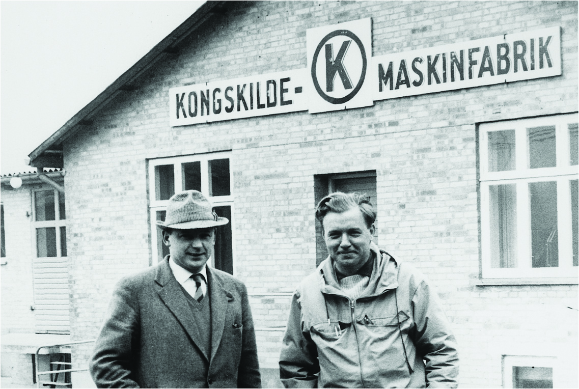 Hans Tyndeskov (th) og Mogens Petersen (tv) foran den oprindelige Kongskilde Fabrik i 1949, som nu er museum.